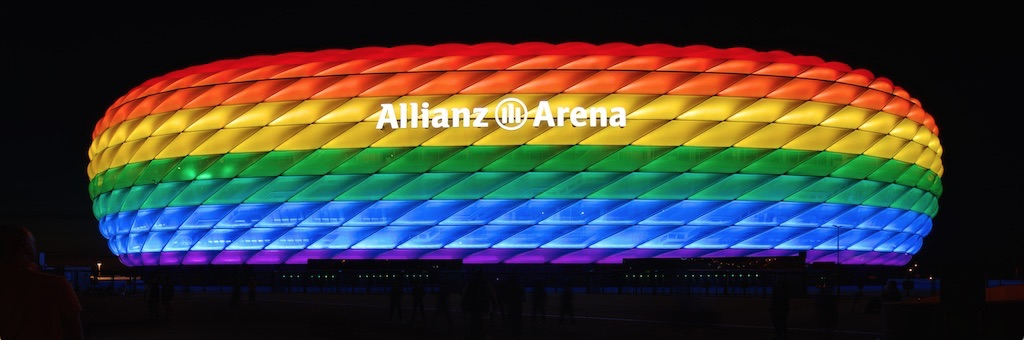 Zum Christopher Street Day erstrahlte die Allianz Arena am Abend des 9. Juli 2016 für dreieinhalb Stunden regenbogenfarbig.